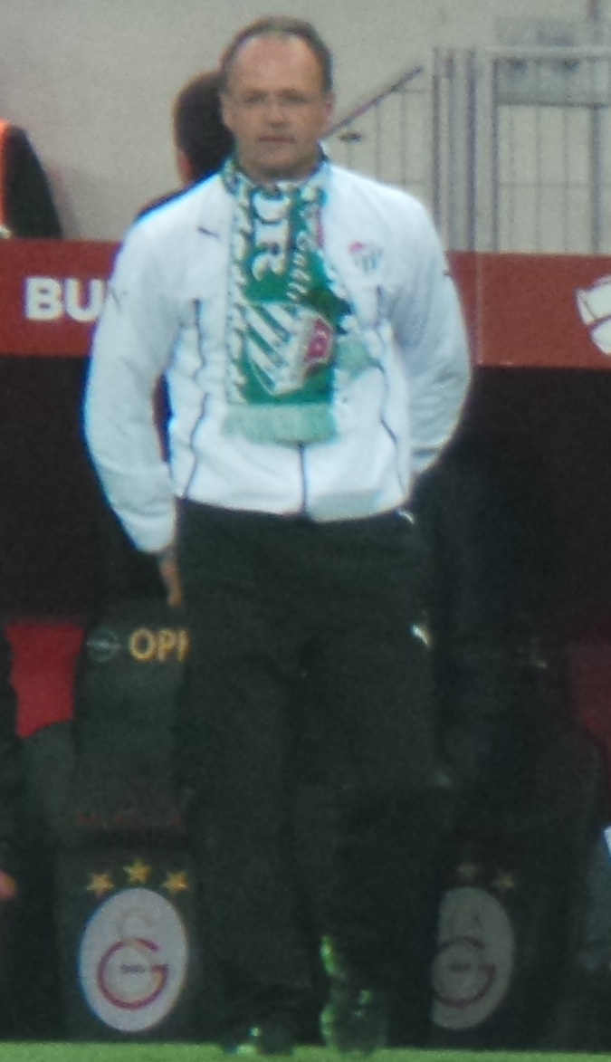 İrfan Buz